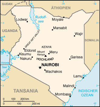 Karte von Kenia CIA World Factbook